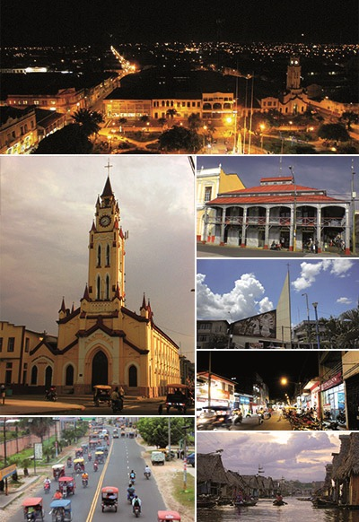 Muestra fotográfica de la Ciudad de Iquitos en un collage.